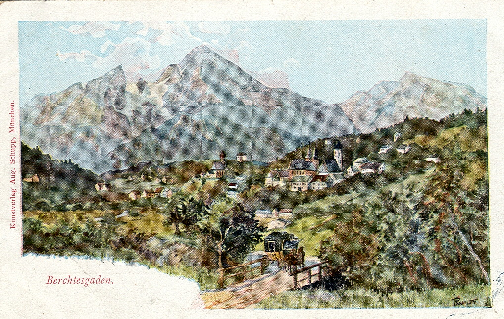 „Berchtesgaden“. Postkarte undatiert.